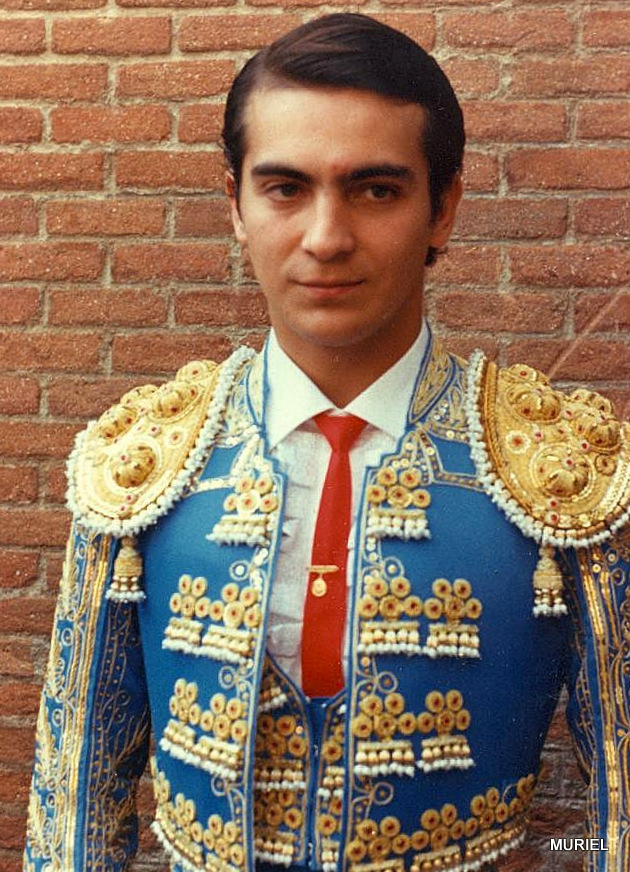 Yiyo en las ventas